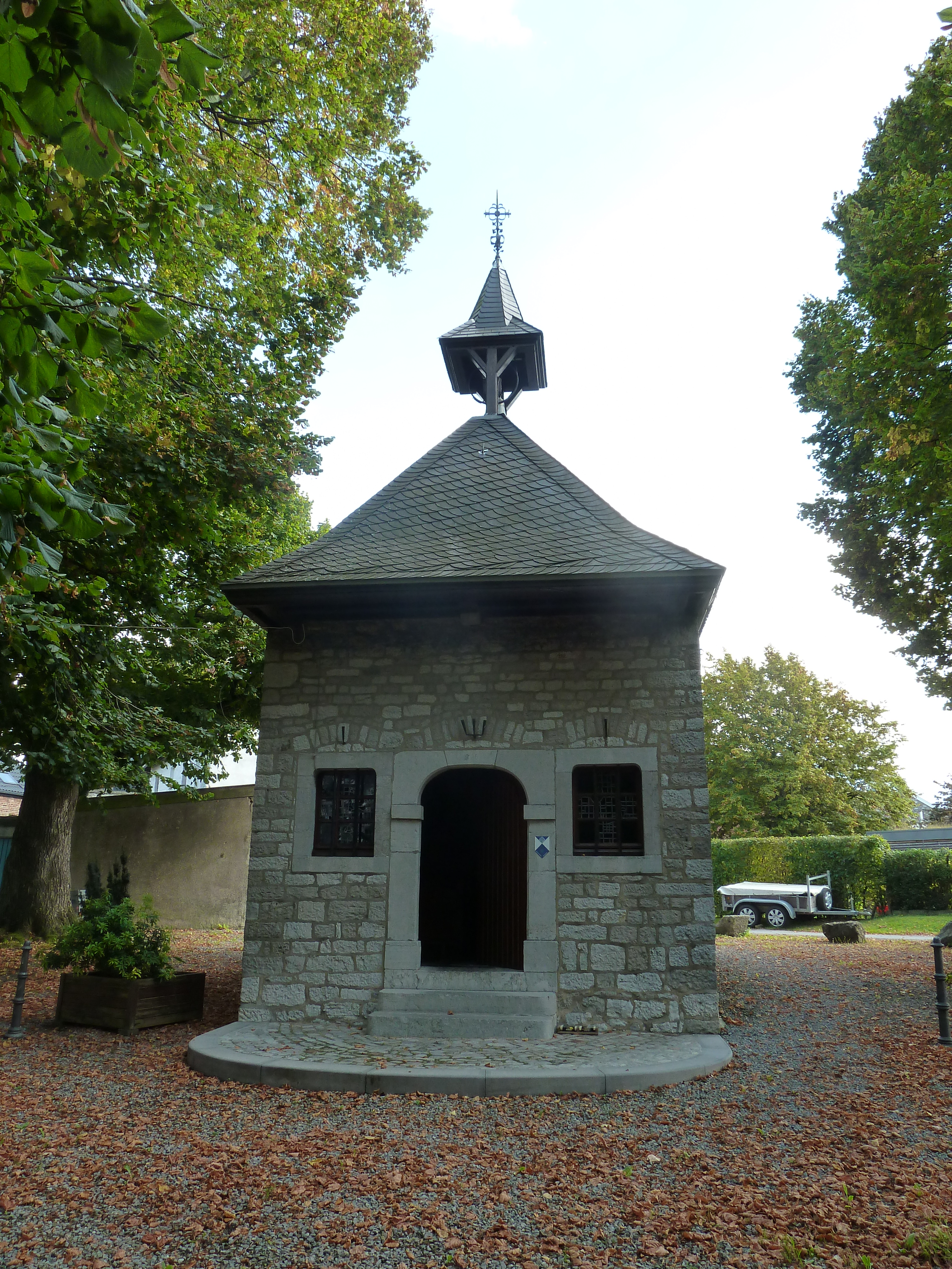 Sint-Annakapel met jaartal 1716, Raeren, België